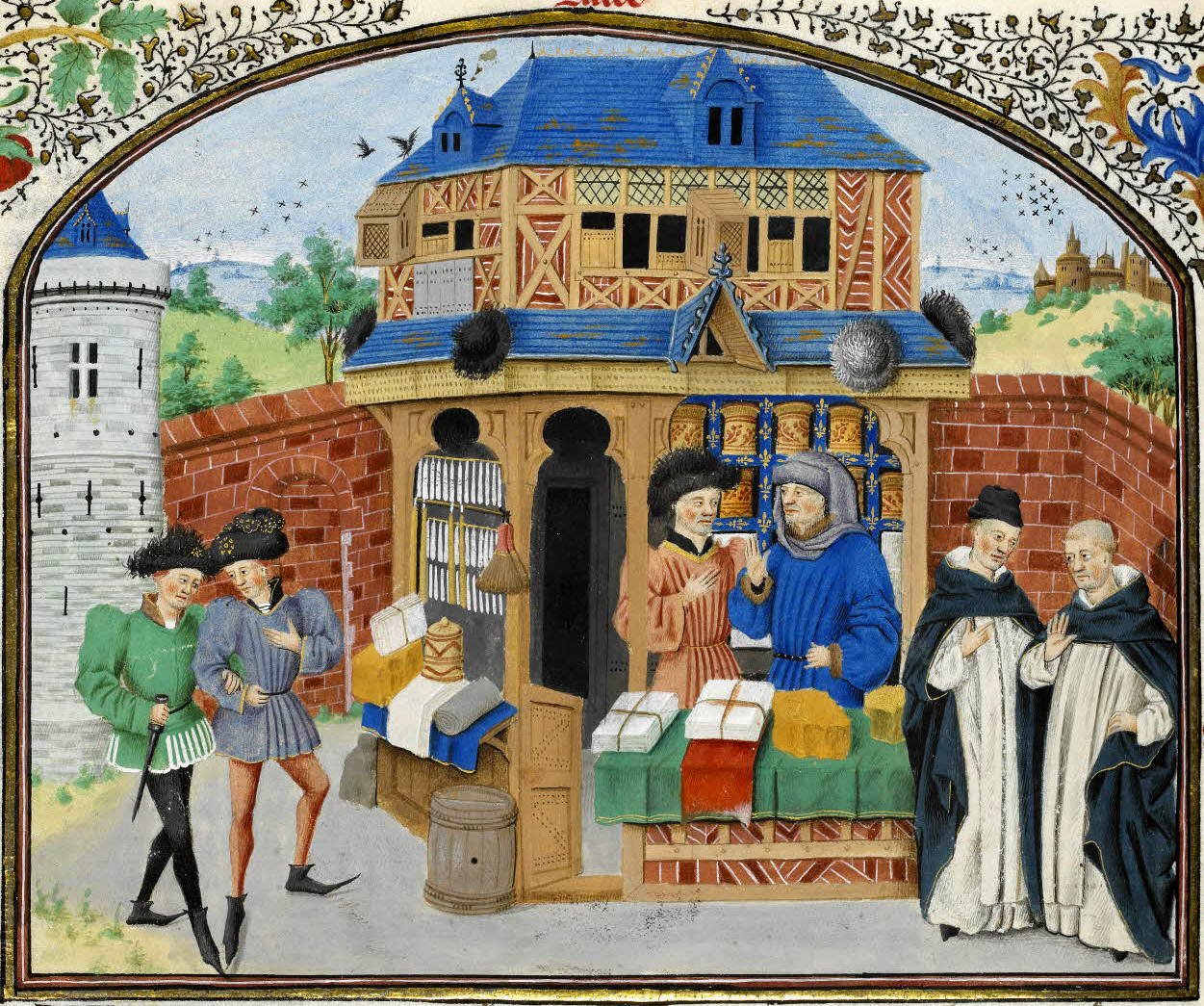 Миниатюра "Три разновидности дружбы" из "Ethics, Politics, and Economics" Аристотеля (Rouen I.2 927). XV век